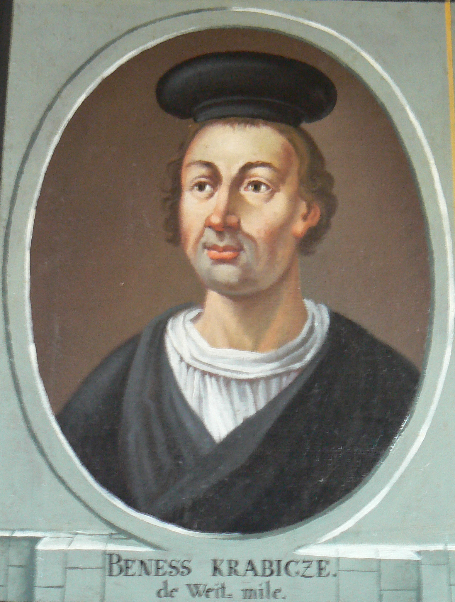 Benesch von Weitmühl